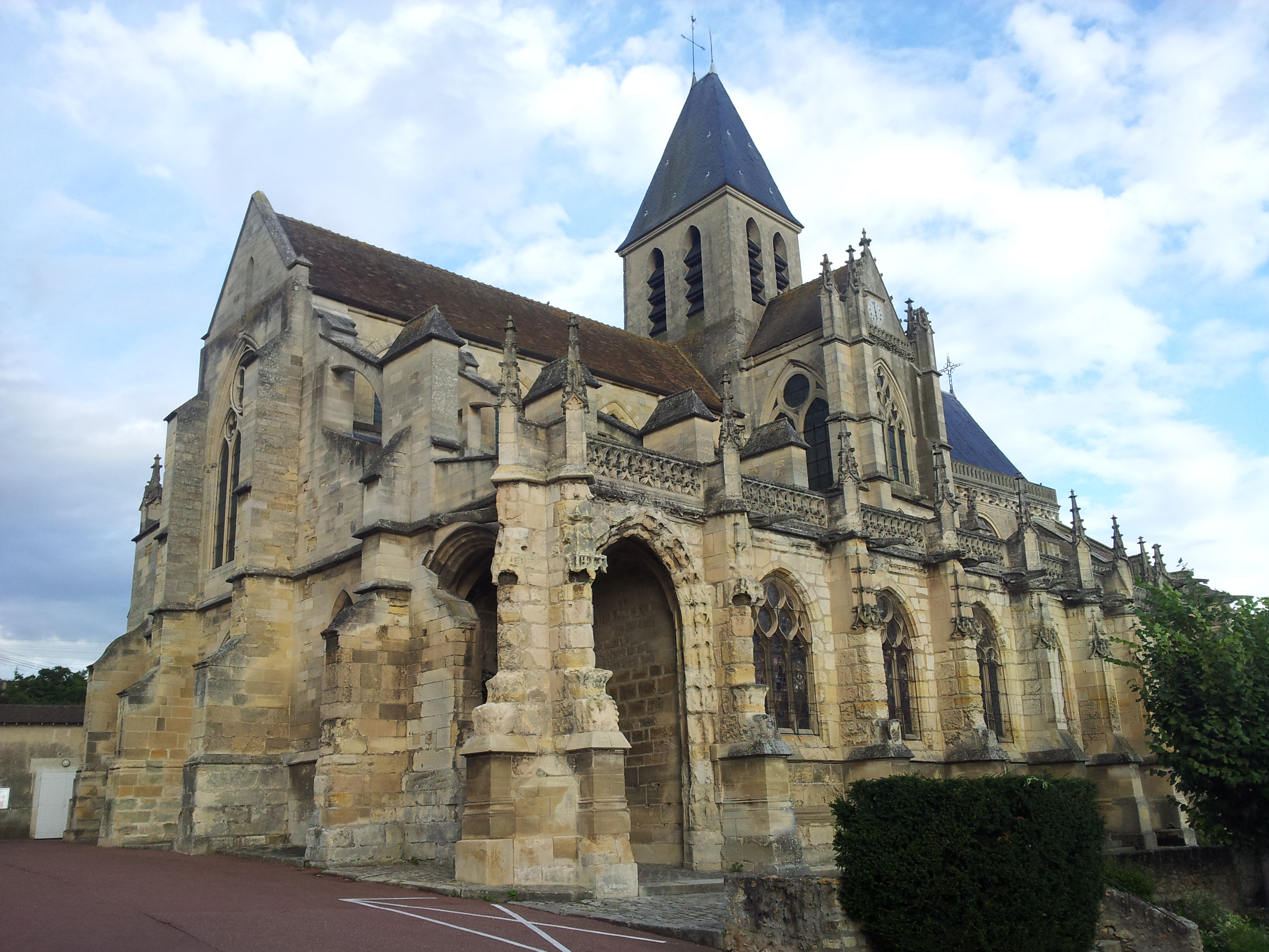 Église Saint-Martin de Triel-sur-Seine .